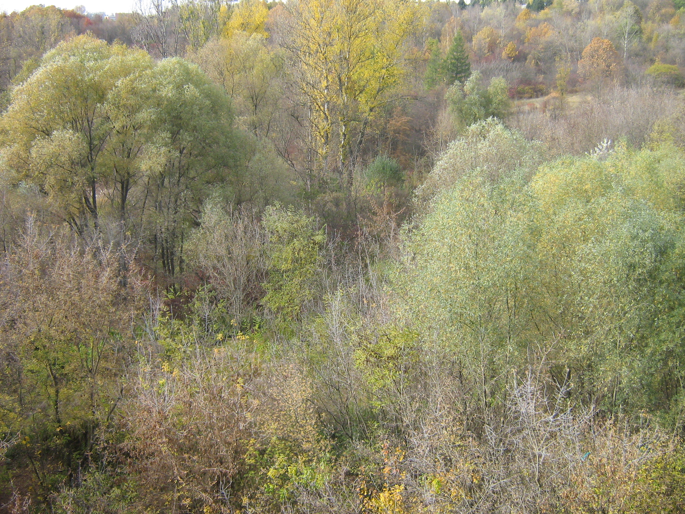 Вид на Саржин Яр сверху (откуда? из Дома проектов или нет?). Харьков.